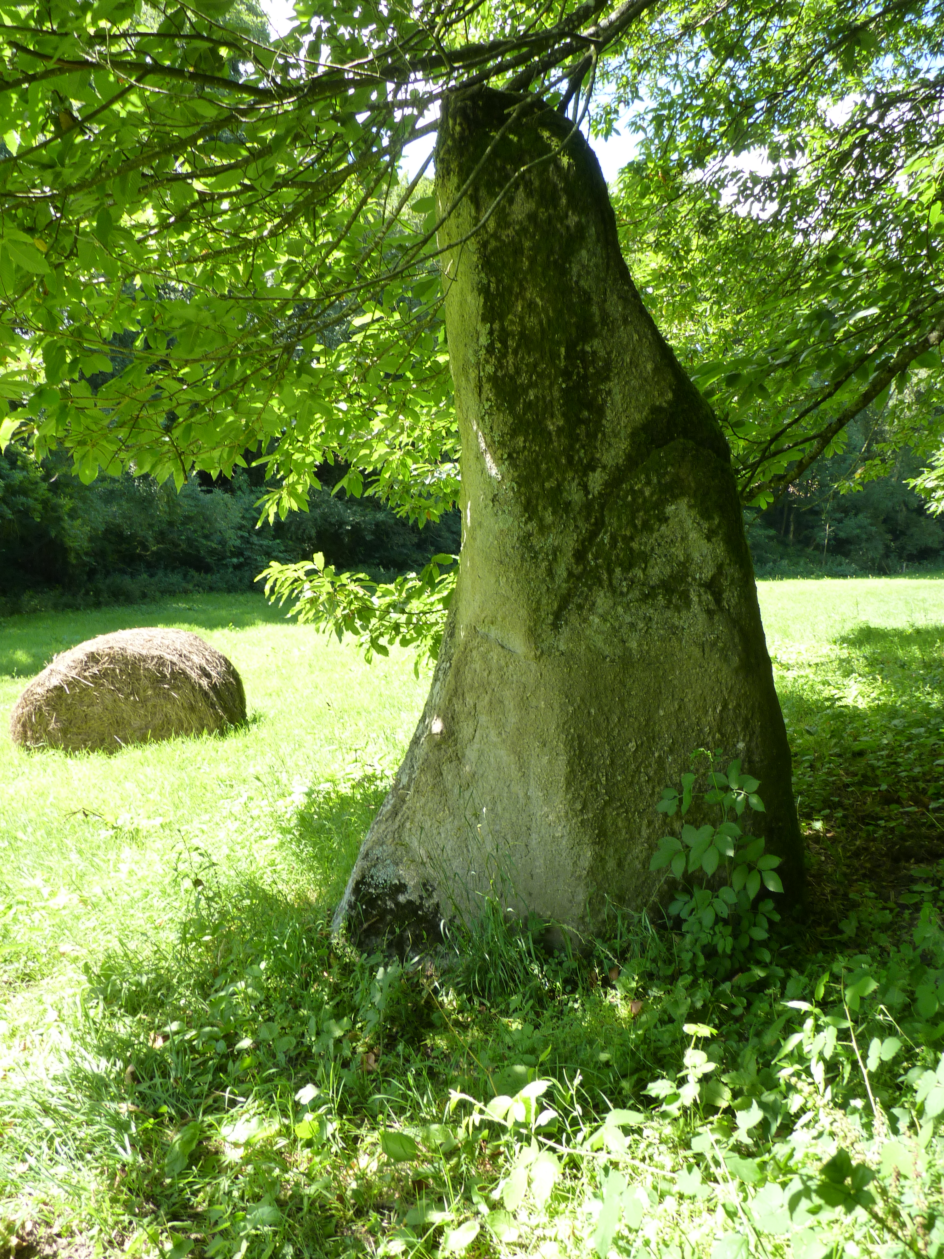 Hauteur estimée à environ 4m